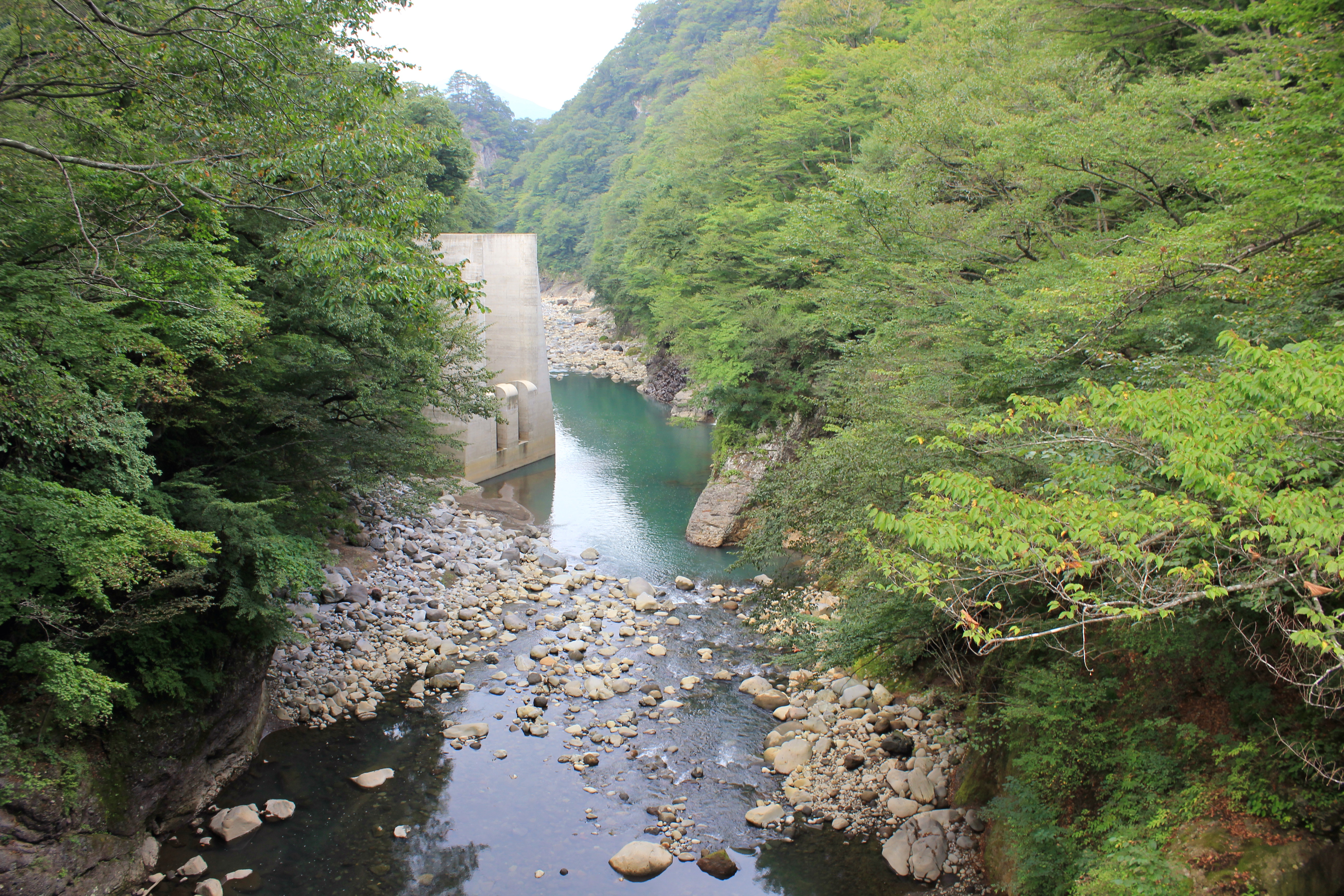 八ッ場ダム建設予定地（2012年撮影）